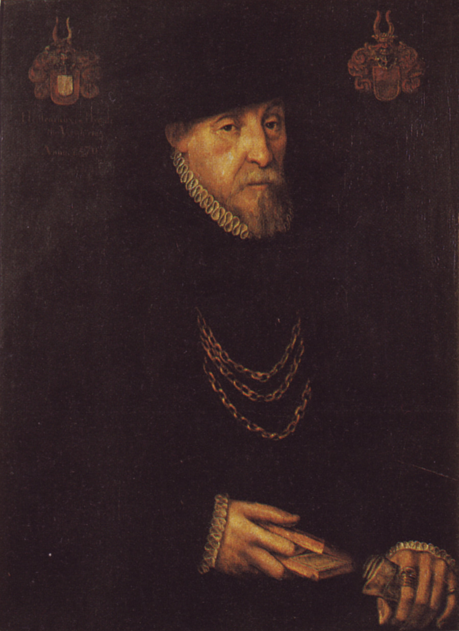 Porträt des Heidenreich Droste zu Vischering (1507-1588)